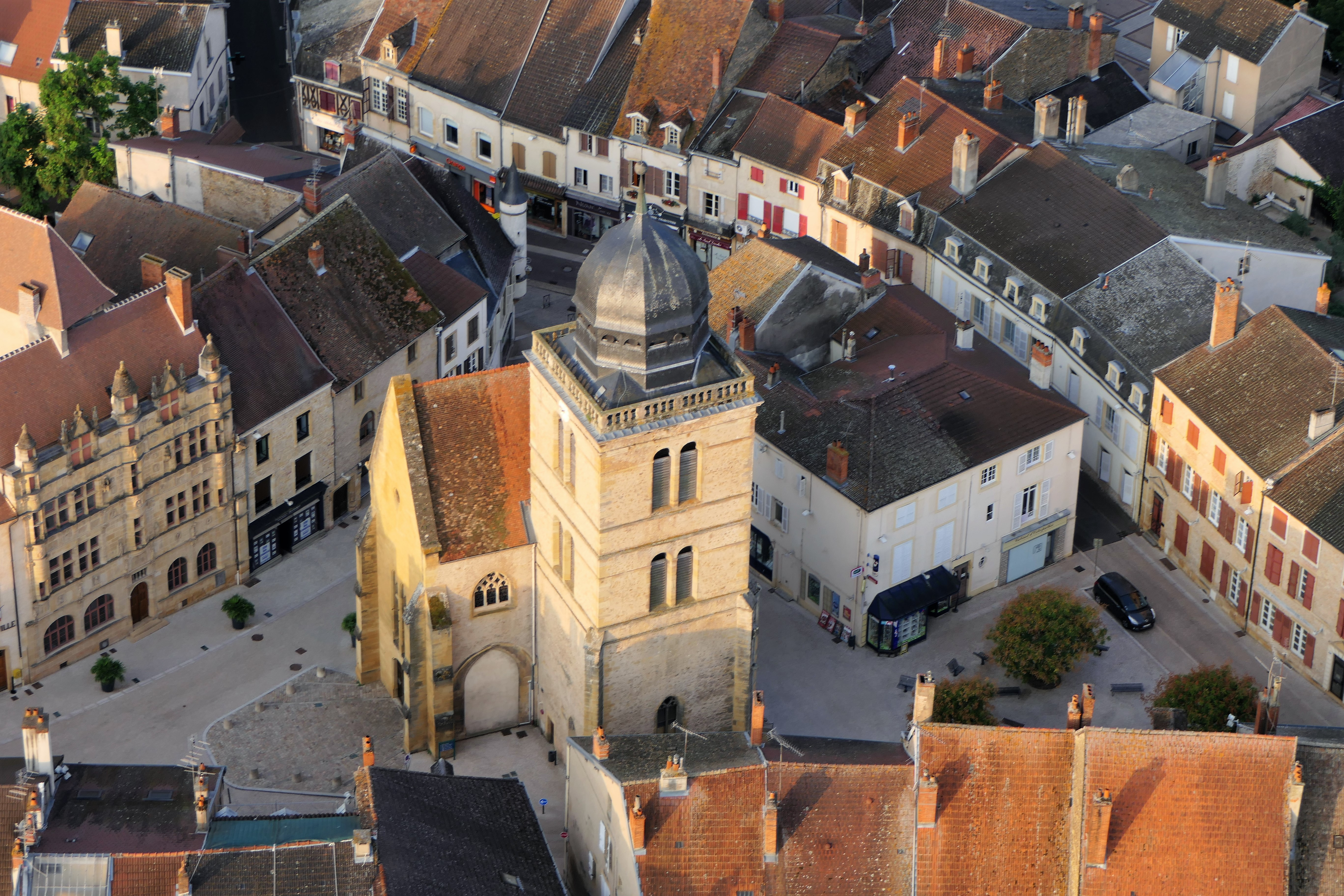 Paray-le-Monial,la tour Saint-Nicolas